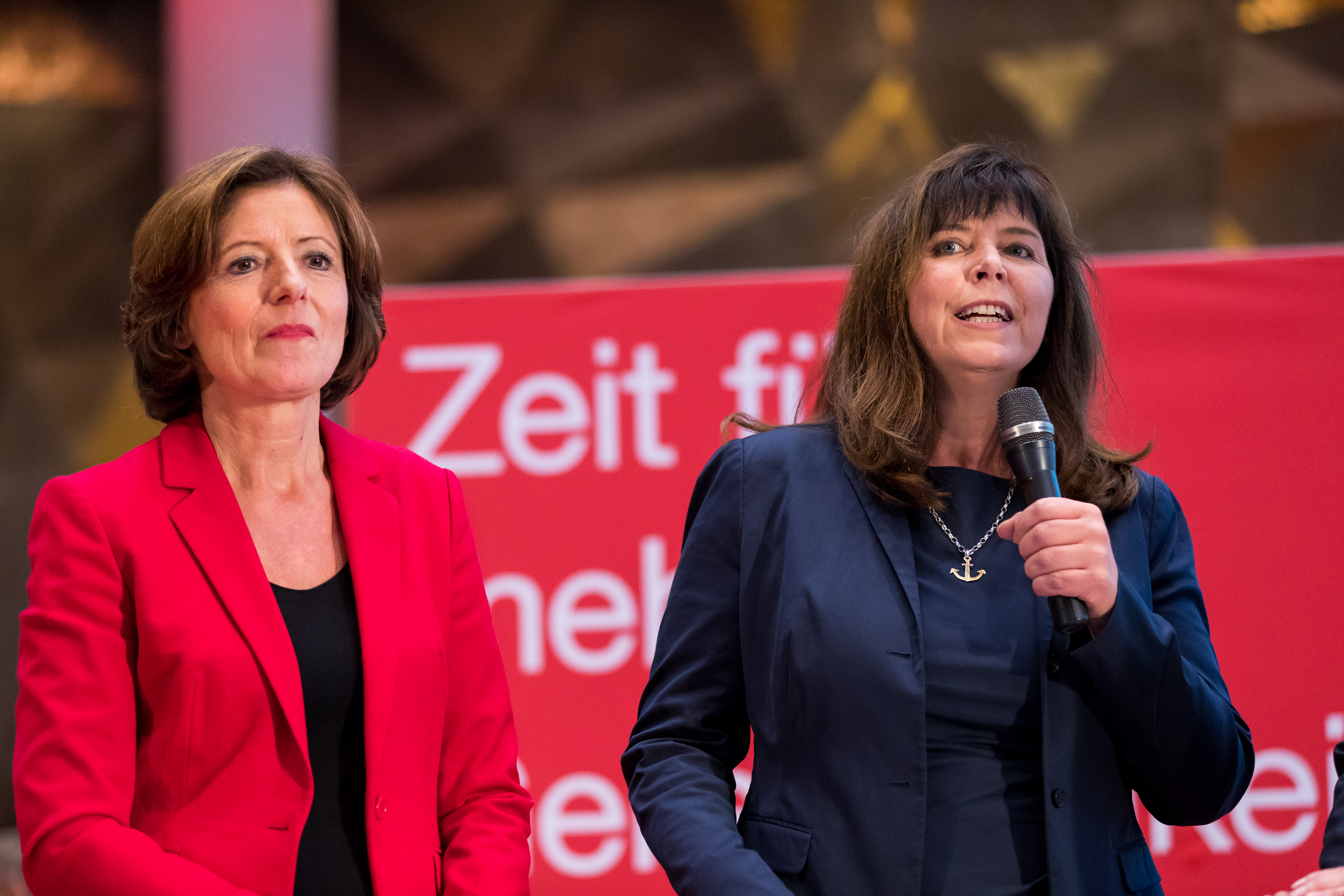 during SPD Wahlkampf Ludwigshafen at Pfalzbau, Ludwigshafen, Rheinland-Pfalz, Germany on 2017-09-13, Photo: Sven Mandel